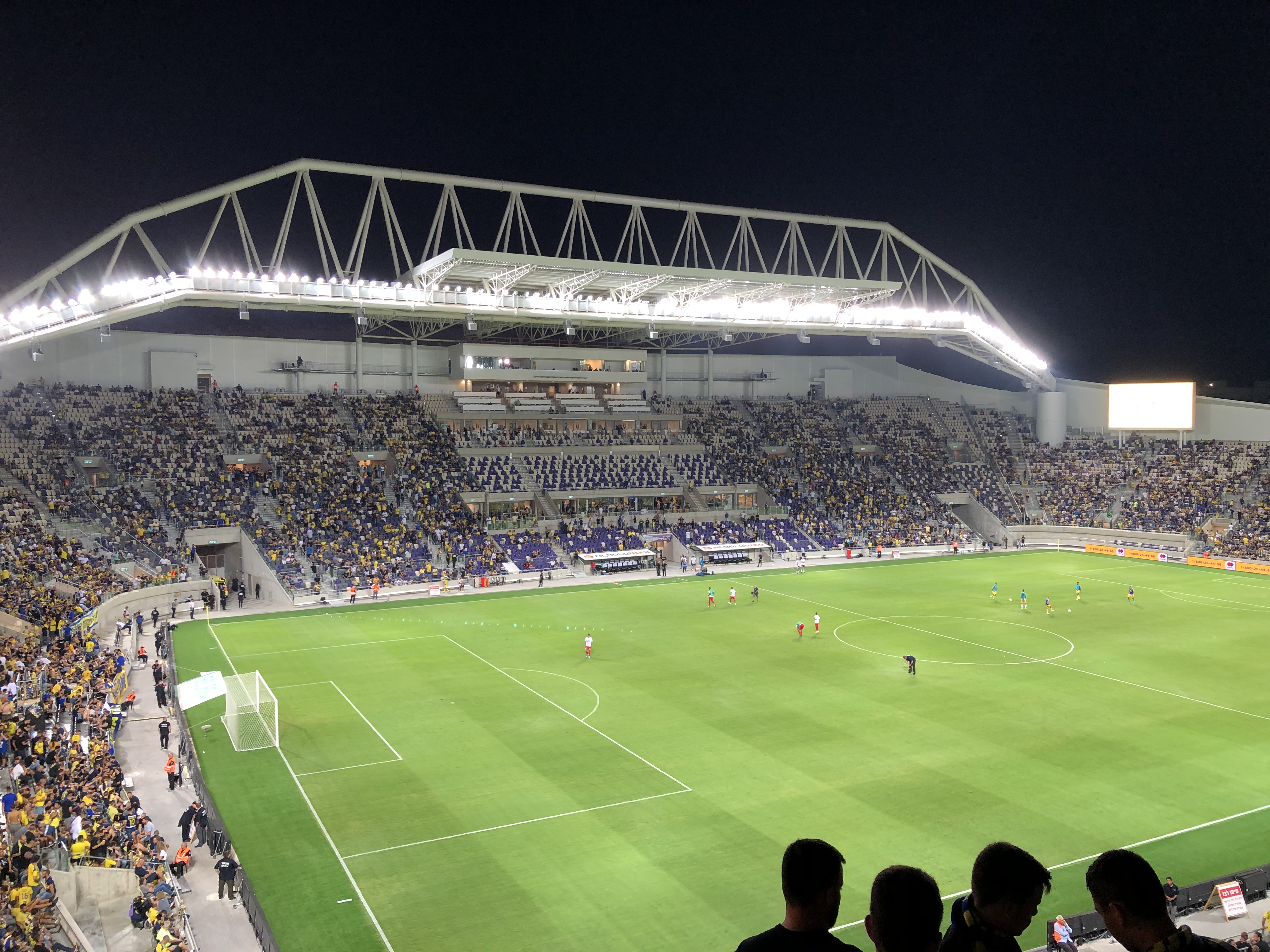 אצטדיון בלומפילד